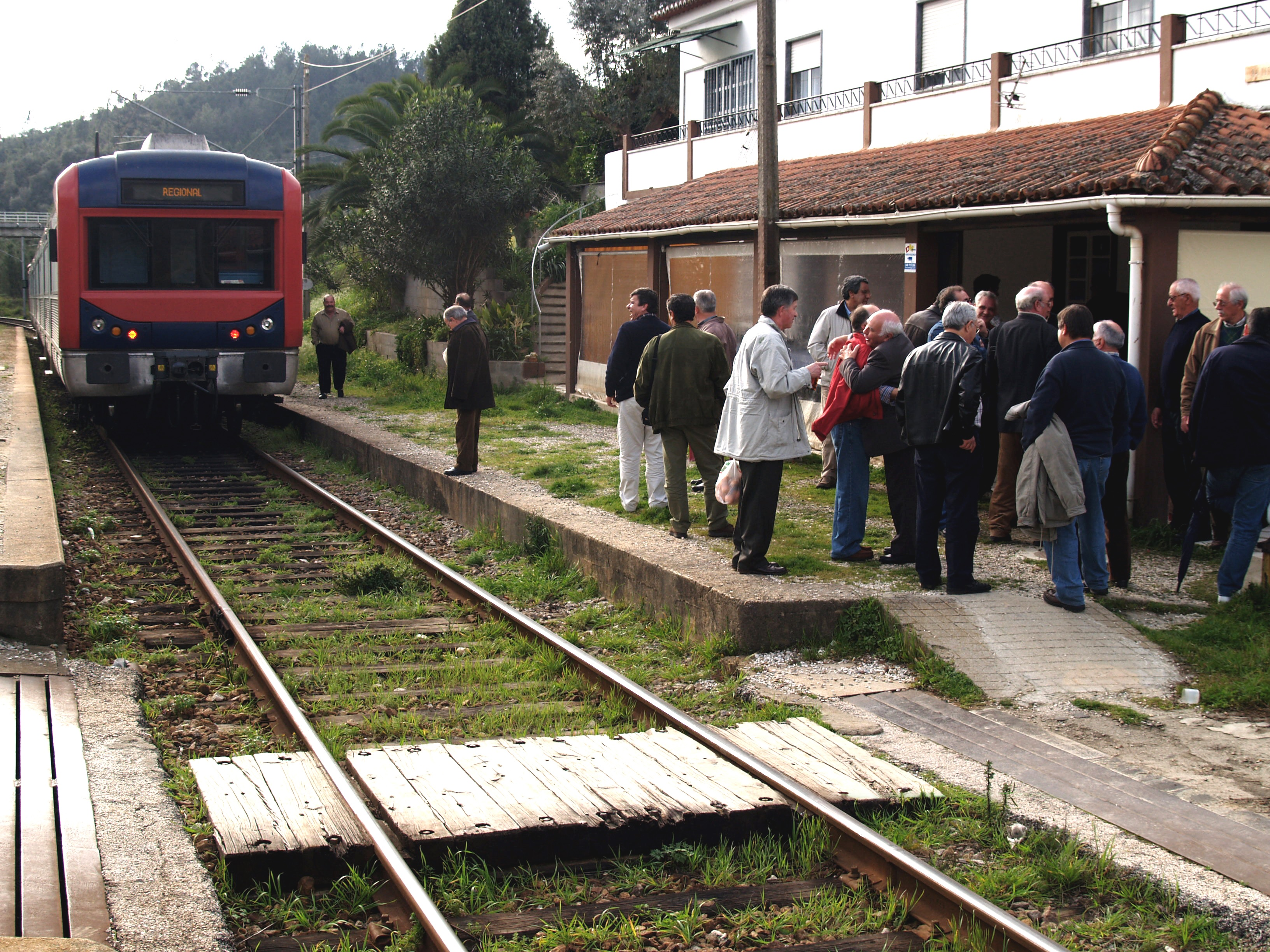 Apeadeiro de Belver - o regresso a Lisboa depois do almoço